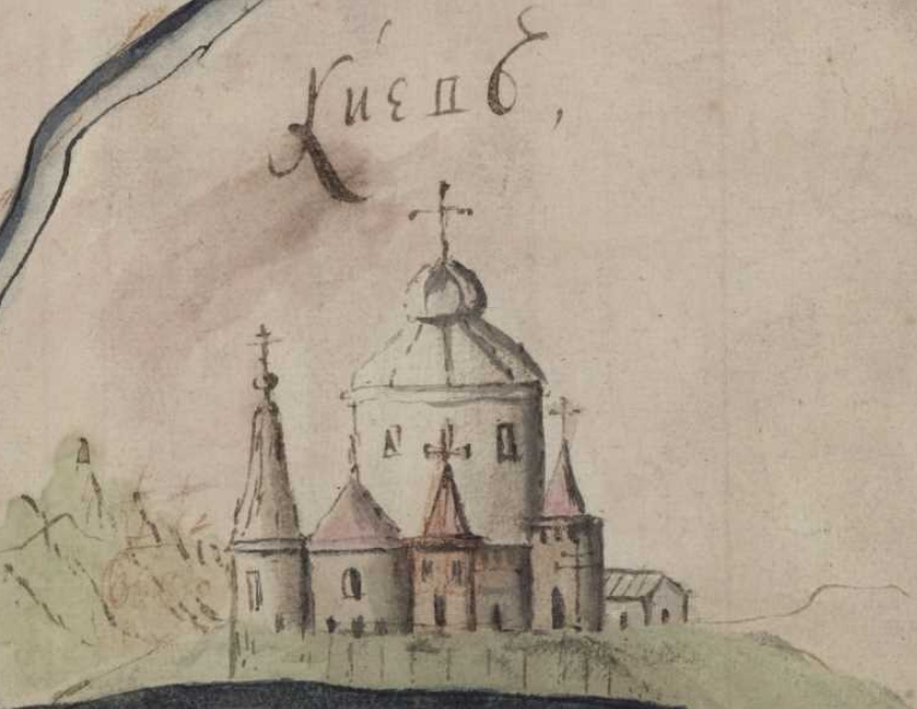 Фрагмент карти Київської губернії. XVIII століття. РГАДА, ф. 192, оп. 1, Киевская губ., № 5.